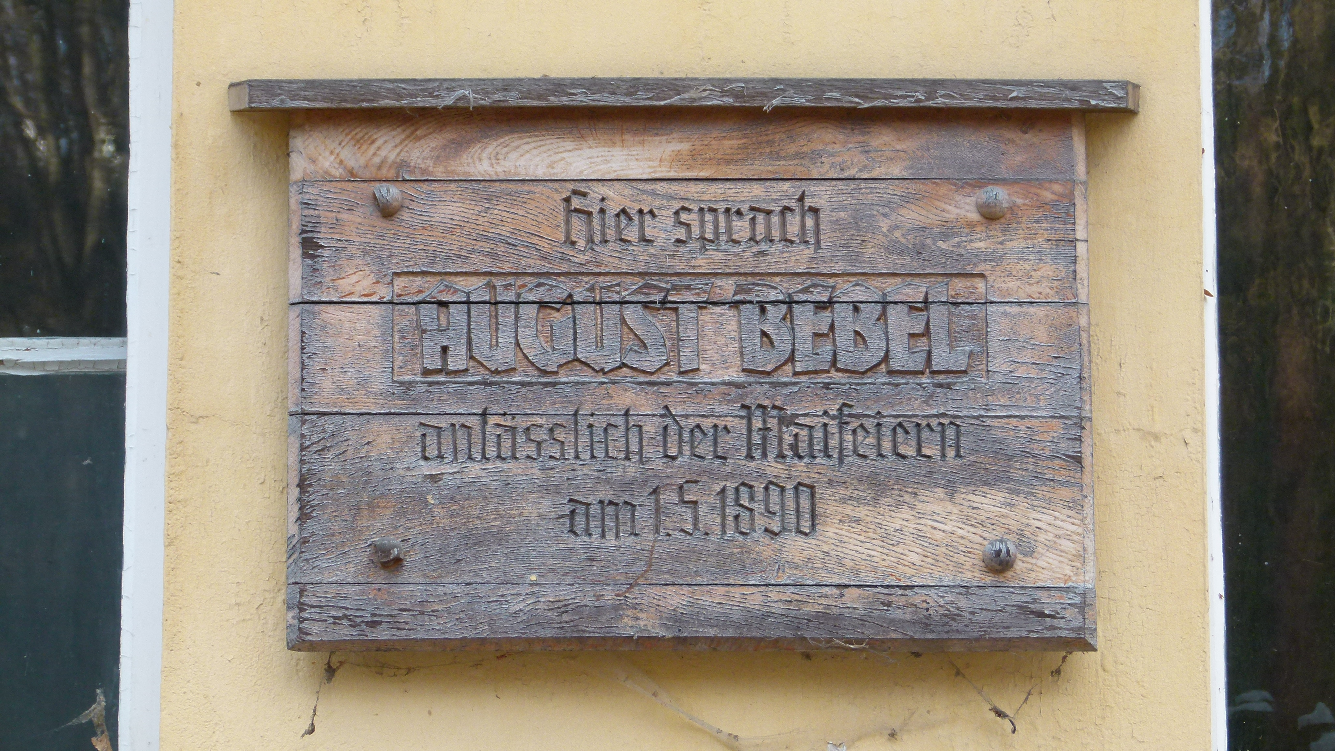 Tafel am denkmalgeschützten Haus, Ulrichstraße 5, Loschwitz, Dresden